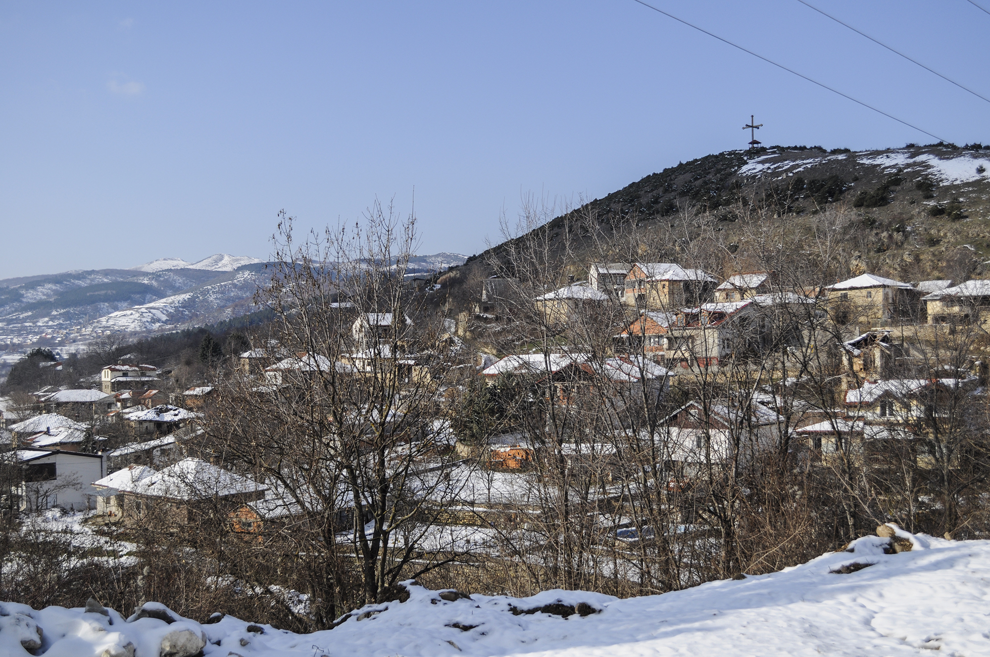 Долно Соње поглед на селото од кај селската црква